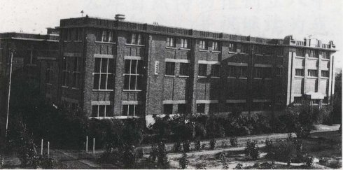 中文（中国大陆）: 1930年代的北疆博物院